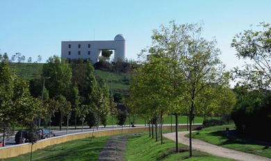 Fotografia de la seu de l'Agrupació Astronòmica de Sabadell al parc Catalunya de Sabadell